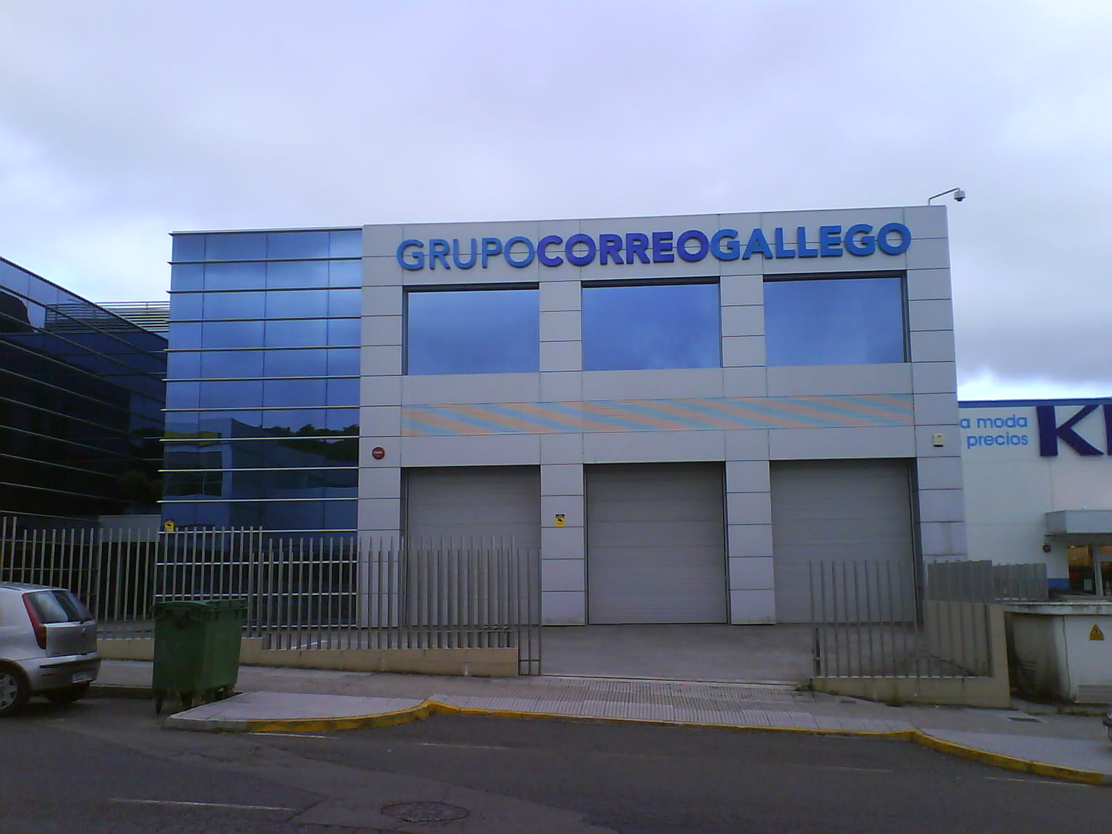 Edificio do Grupo Correo Gallego en Santiago de Compostela.